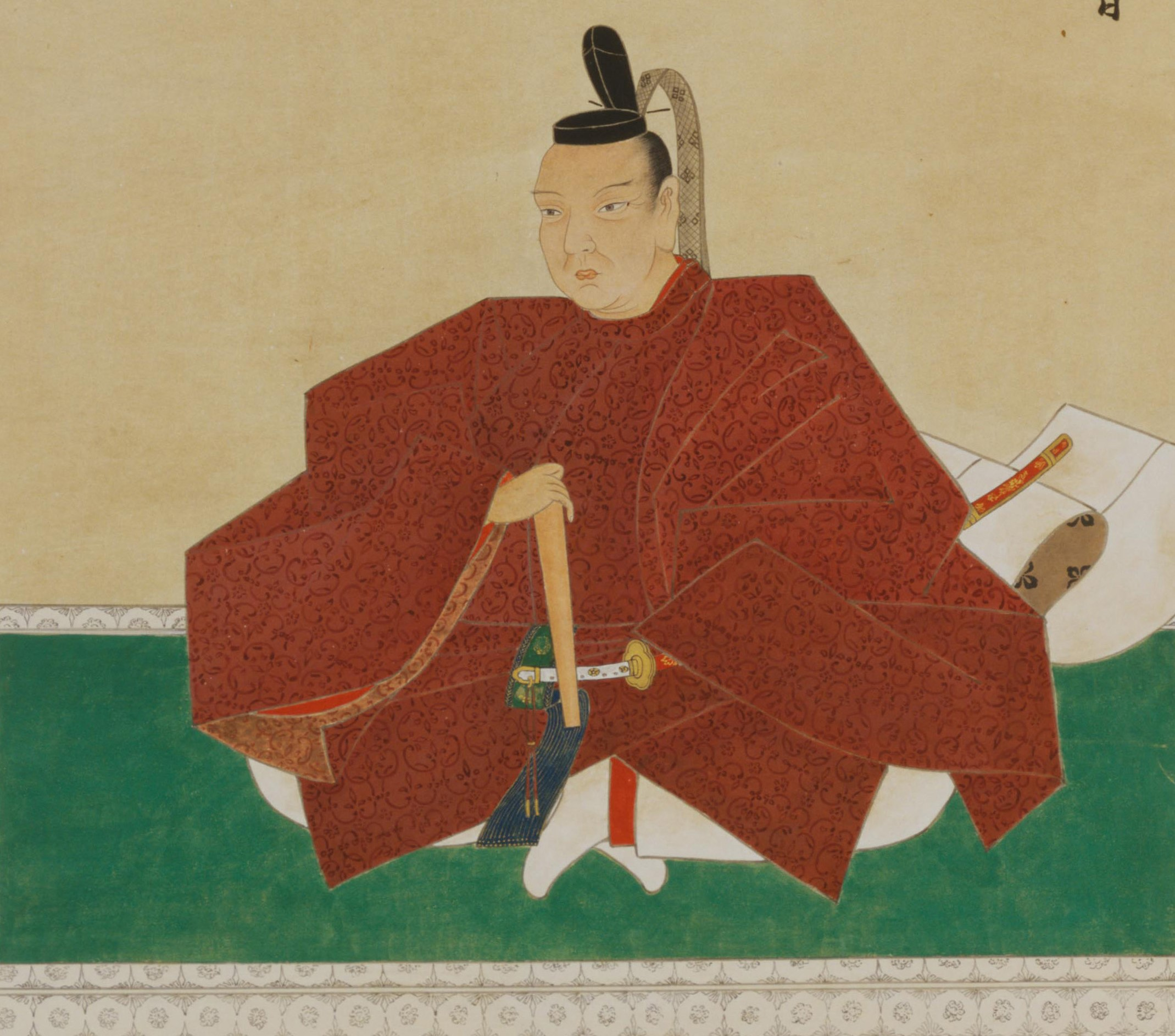 津軽信枚の肖像。